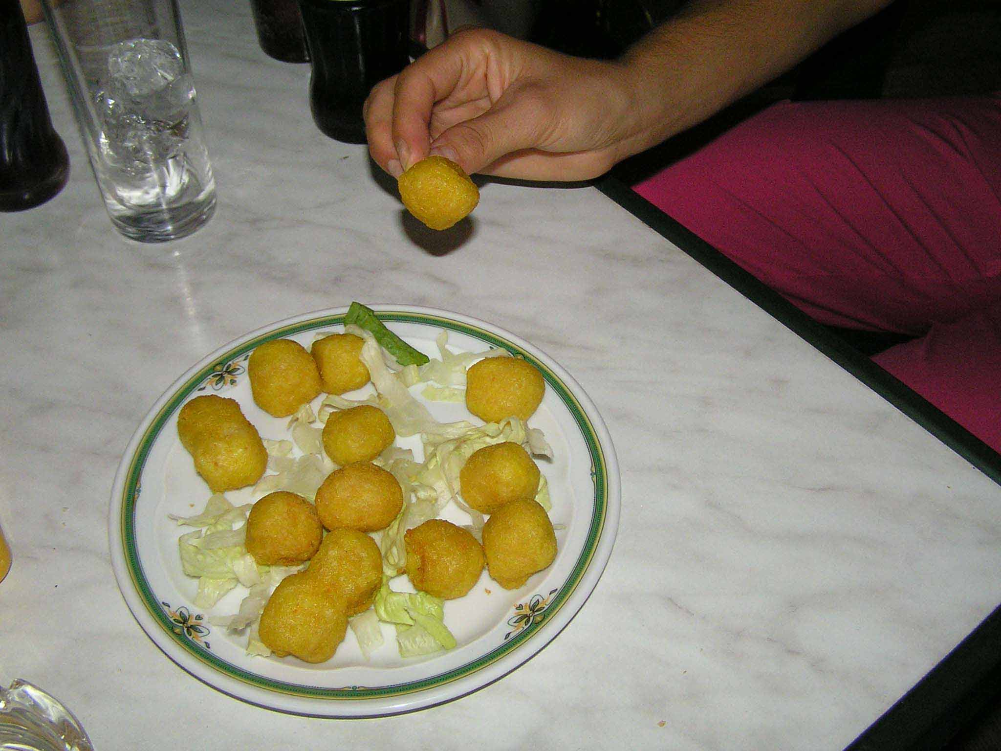 Alimentos en forma de bolita, en Alcalá la Real, Jaén, España.